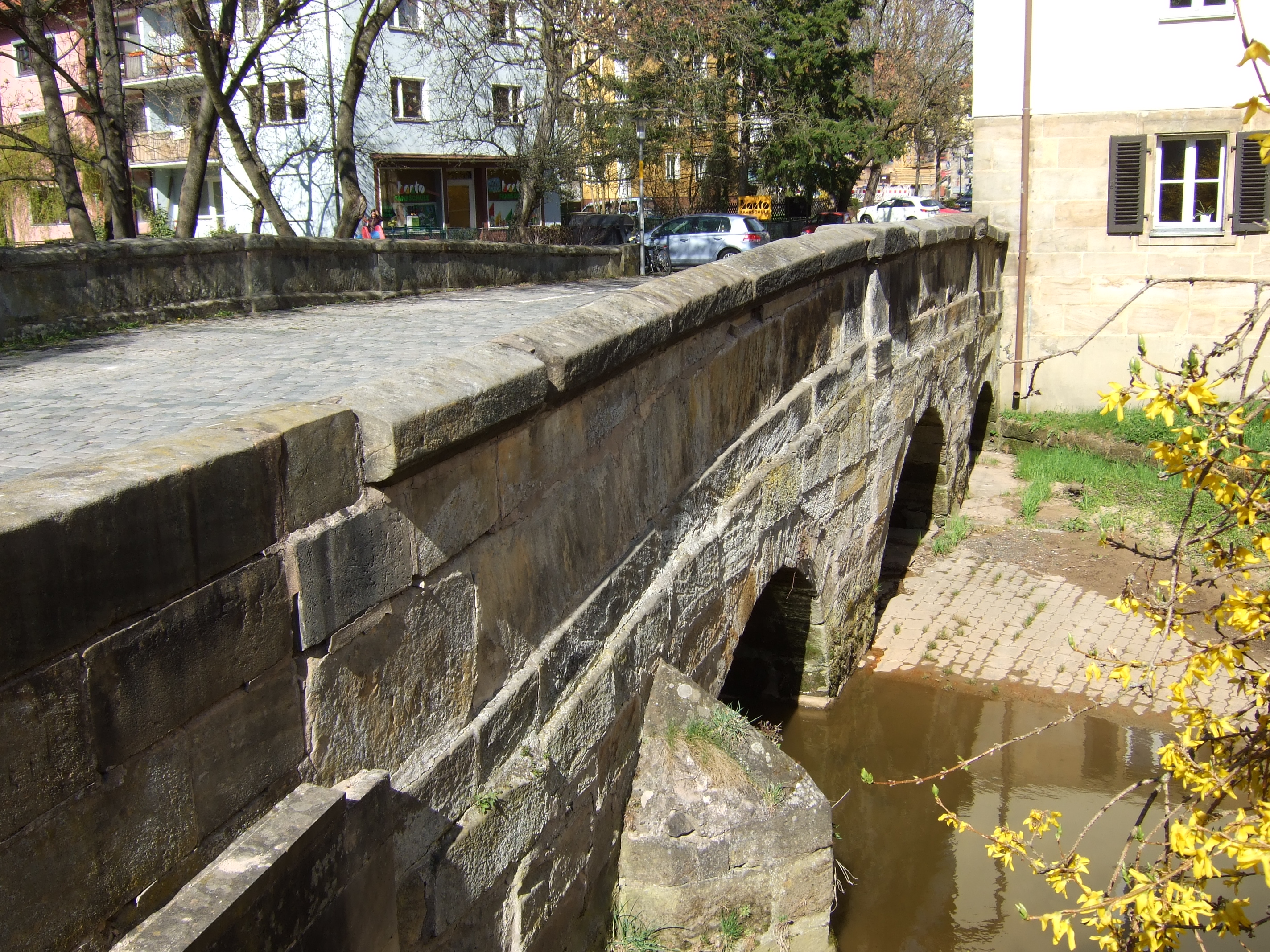 BT Sendelbach von Osten kommend an der Brücke Moritzhöfen